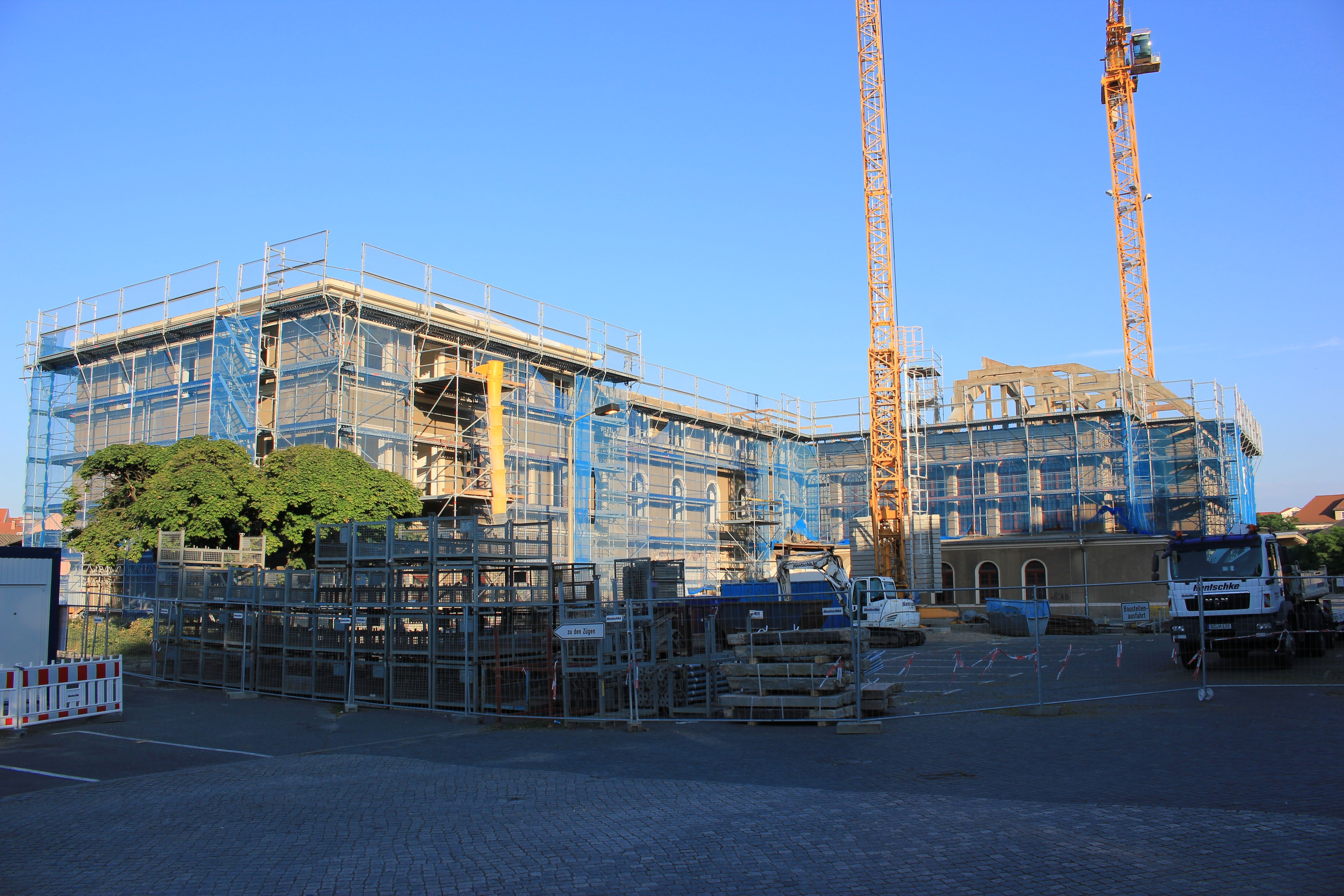 Hornjoserbsce: Přetwar Budyskeho dwórnišća w juniju 2018.